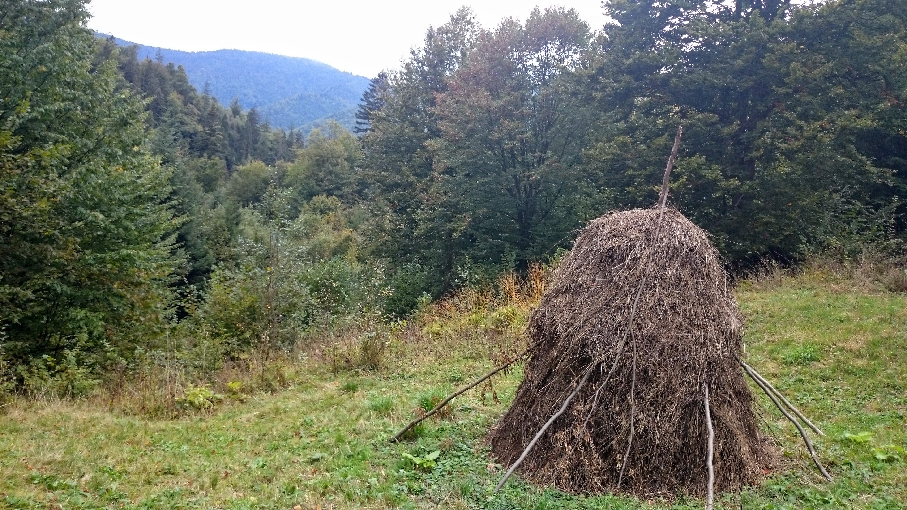 Закинута копиця сіна на схилі гори в Карпатах